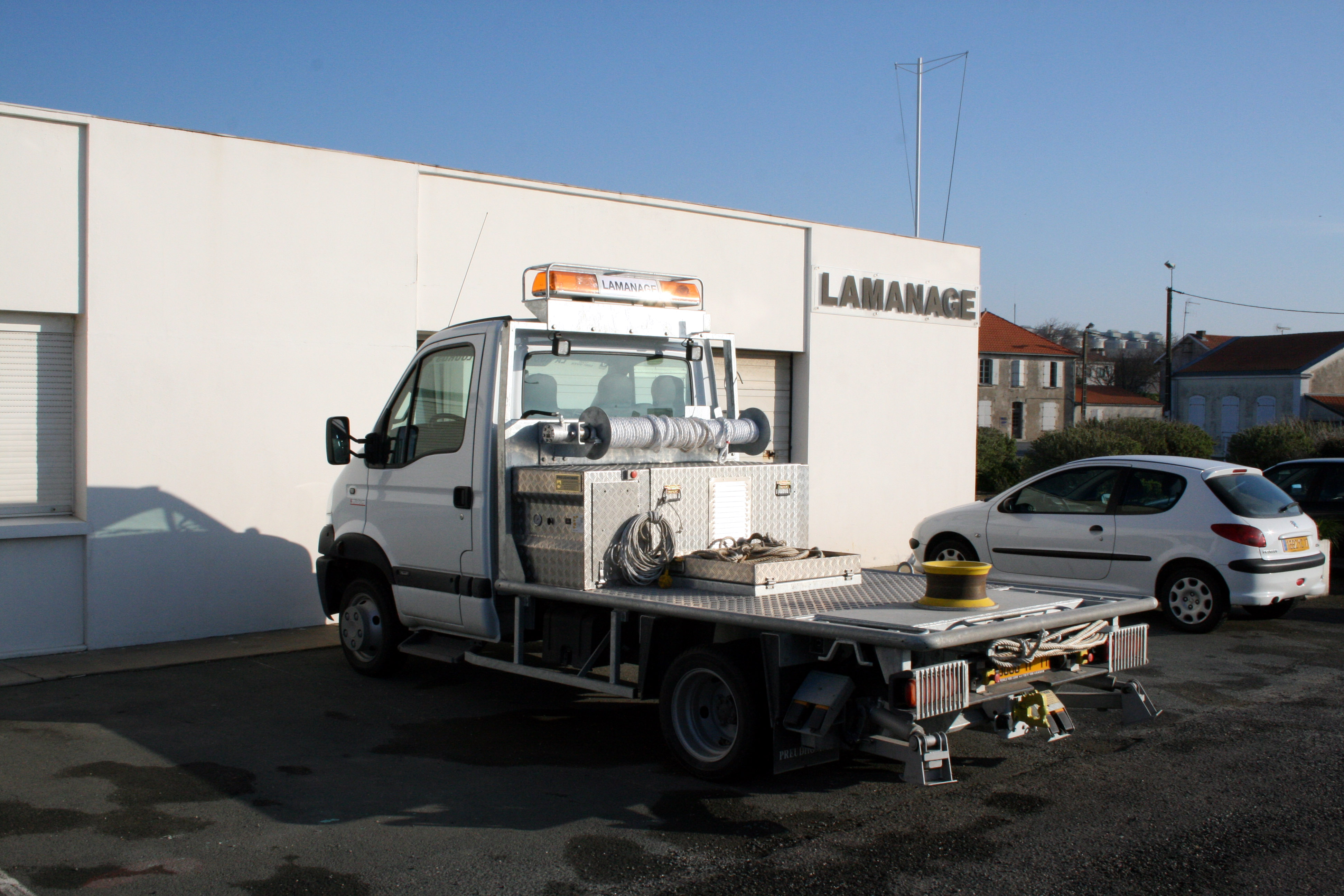 Camion de lamanage dans le port de la Rochelle